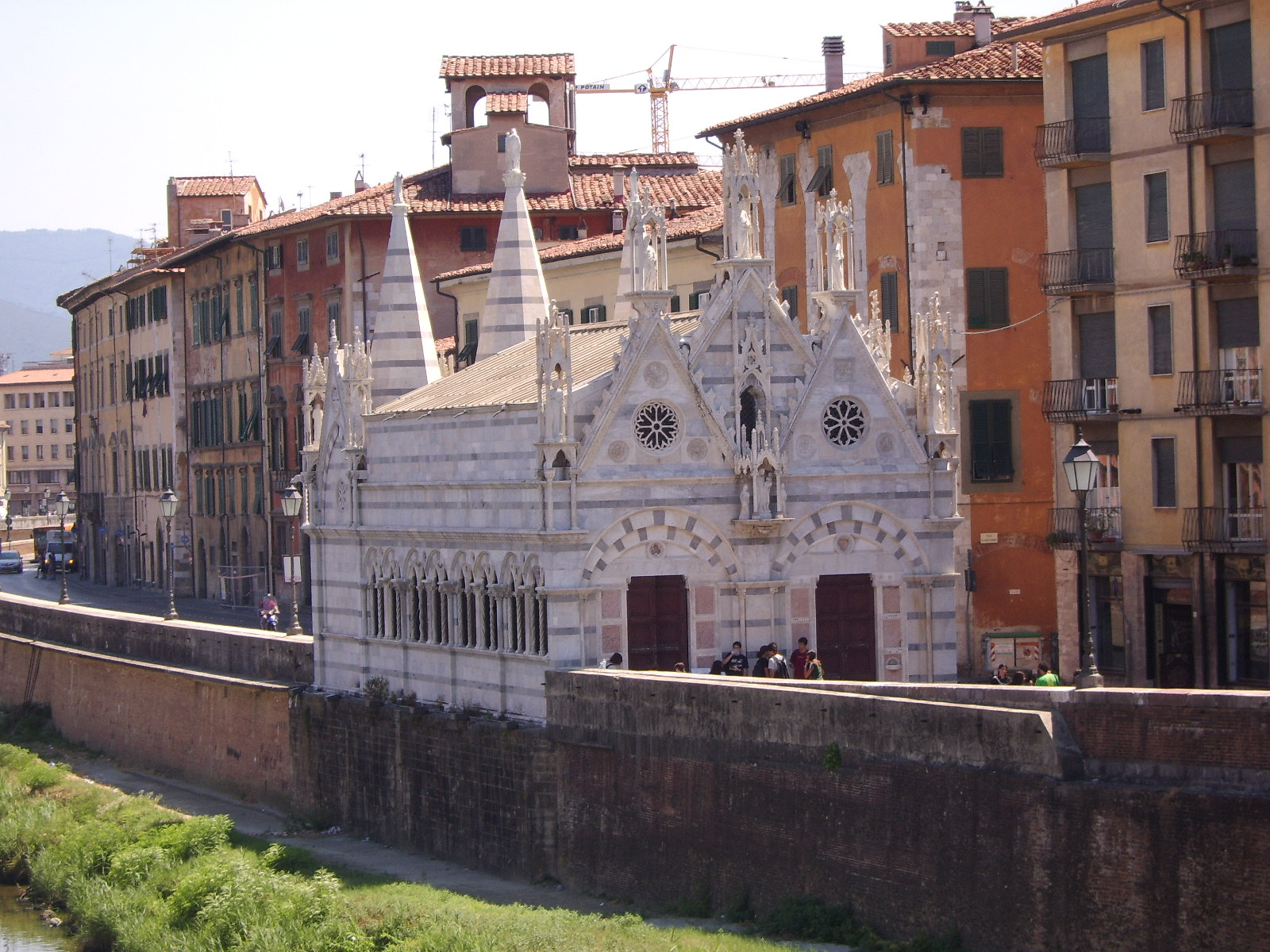 Pise, chiesa della Spina, Lungarno.